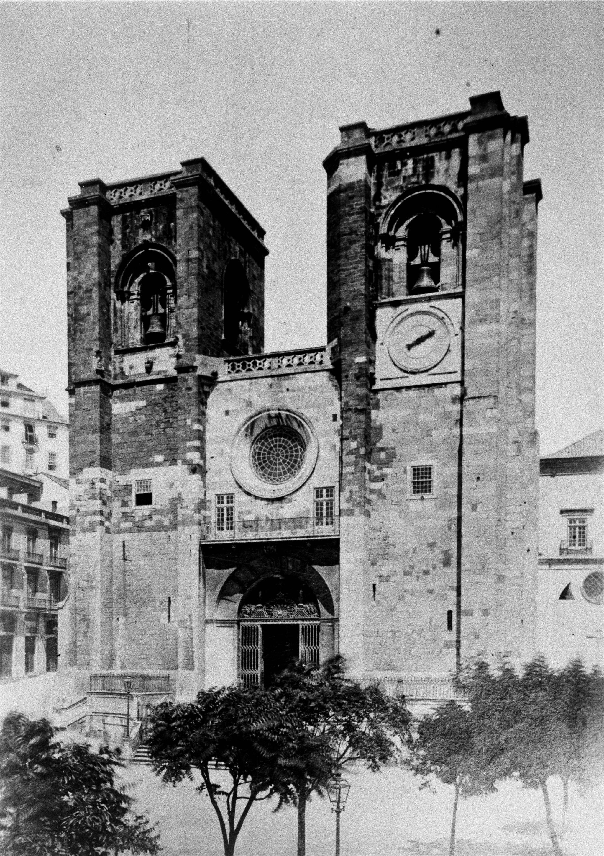 Título: Sé de Lisboa depois das obras realizadas no século XVIII e primeira metade do século XIX Dimensão: 6 x 9 cm Suporte: Negativo de gelatina e prata em acetato de celulose Nota de publicação : CASTILHO, Júlio de - Lisboa Antiga : Bairros Orientais, vol. 5 Assunto: Candeeiro de rua / Relógio de rua / Sé de Lisboa Código de referência: PT/AMLSB/EDP/001629